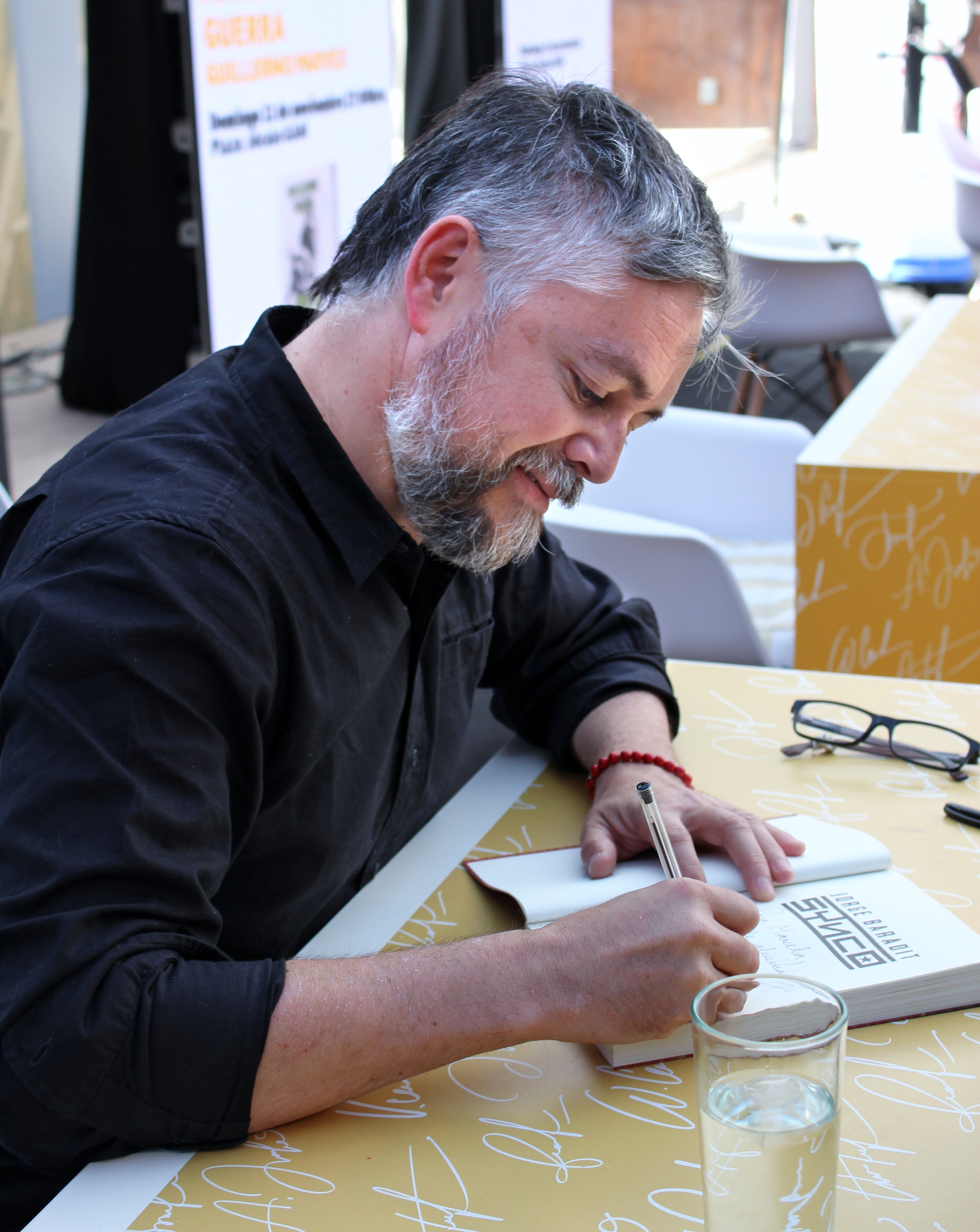 El escritor chileno Jorge Baradit durante una sesión de firma de sus libros en la segunda etapa del Festival de Autores de Santiago 2018 realizada en el GAM.